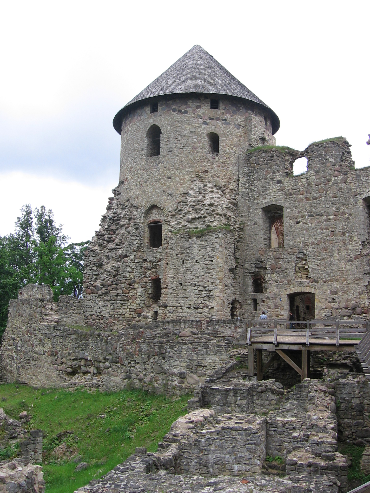 Võnnu ordulinnuse elutorn (ordumeistri elukoht)